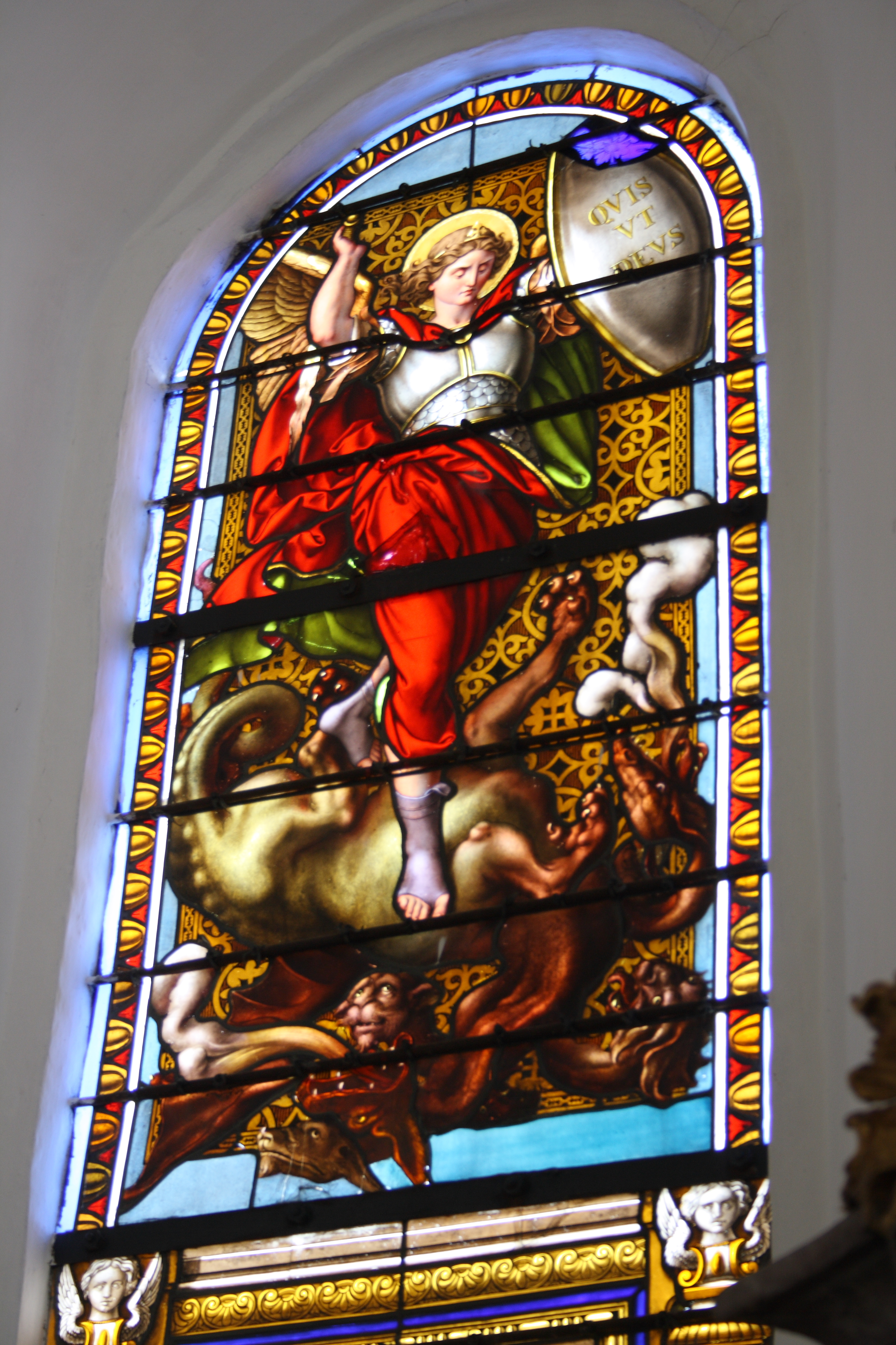 Katholische Pfarrkirche St. Michael in Lutzingen, einer Gemeinde im Landkreis Dillingen an der Donau (Bayern), zentrales Chorfenster mit der Darstellung des hl. Michaels